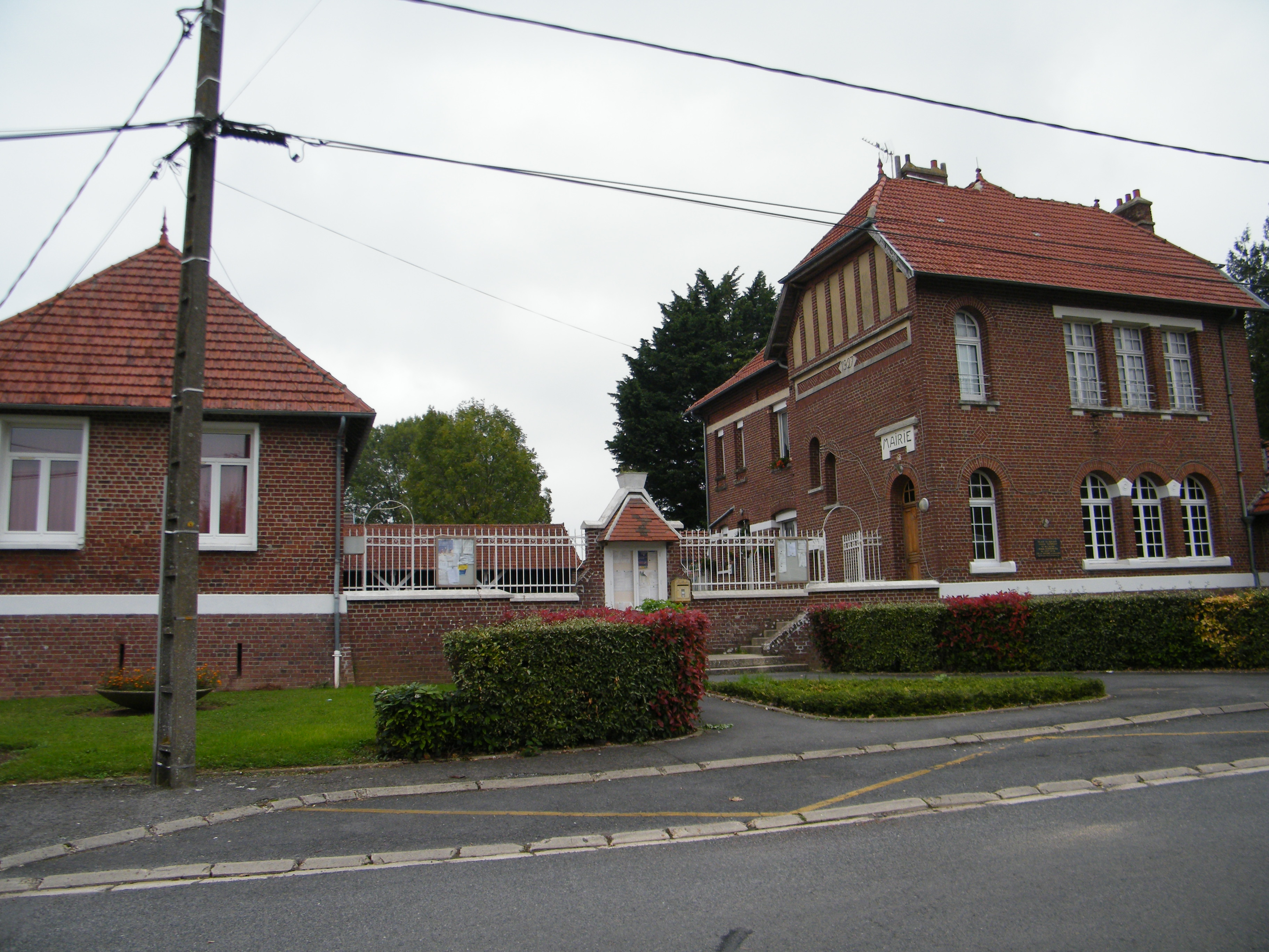 Bâtiments communaux.